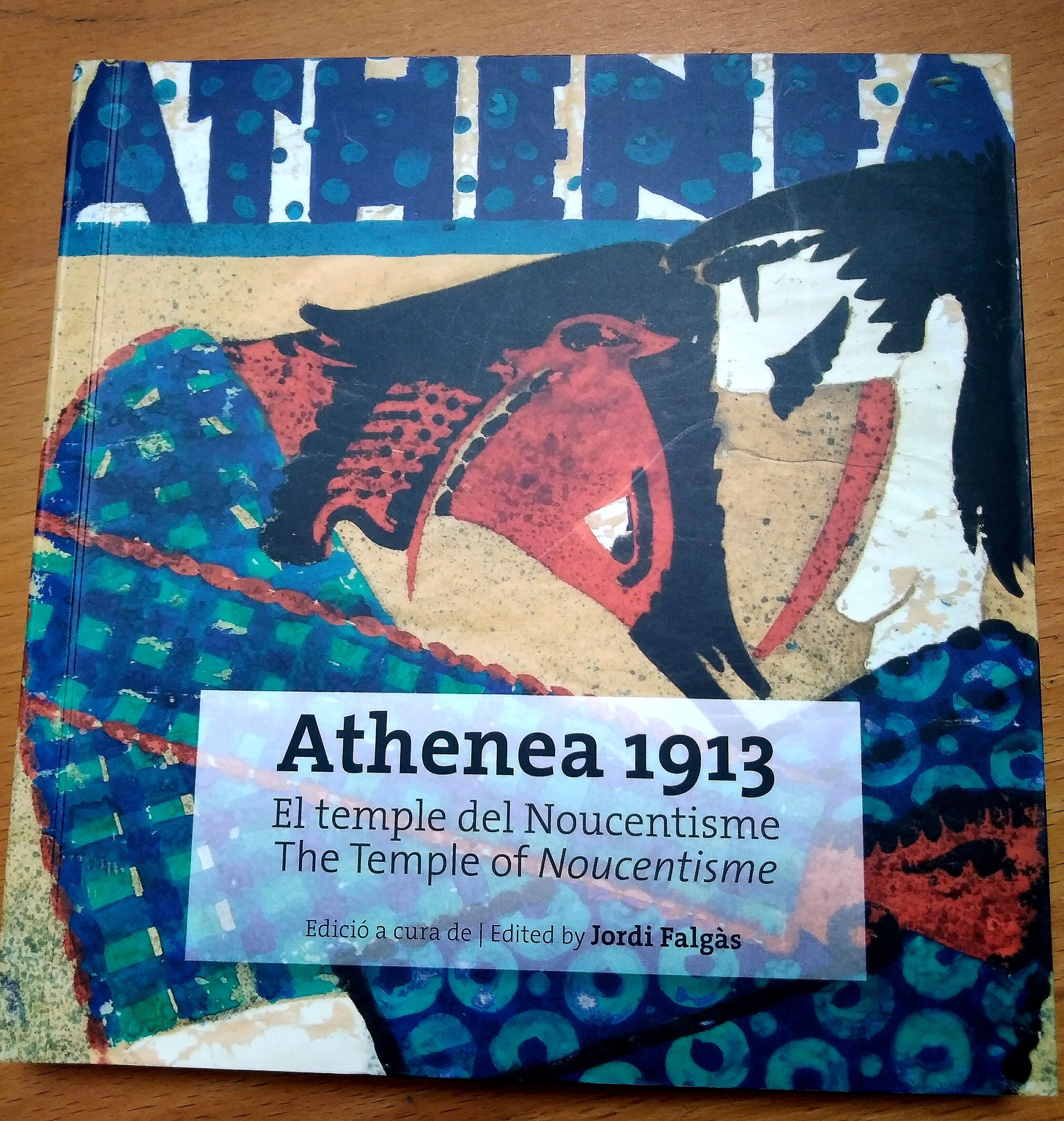 Portada del Catàleg de l'exposició dedicada a Athenea